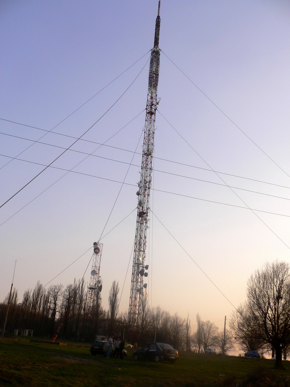 Releu, Bucium, Iasi